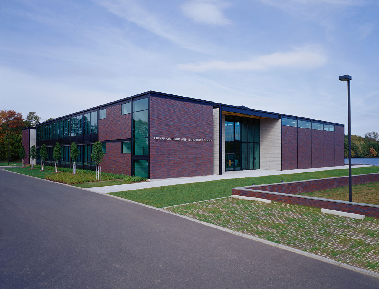 TRUMPF Standort in Farmington, USA